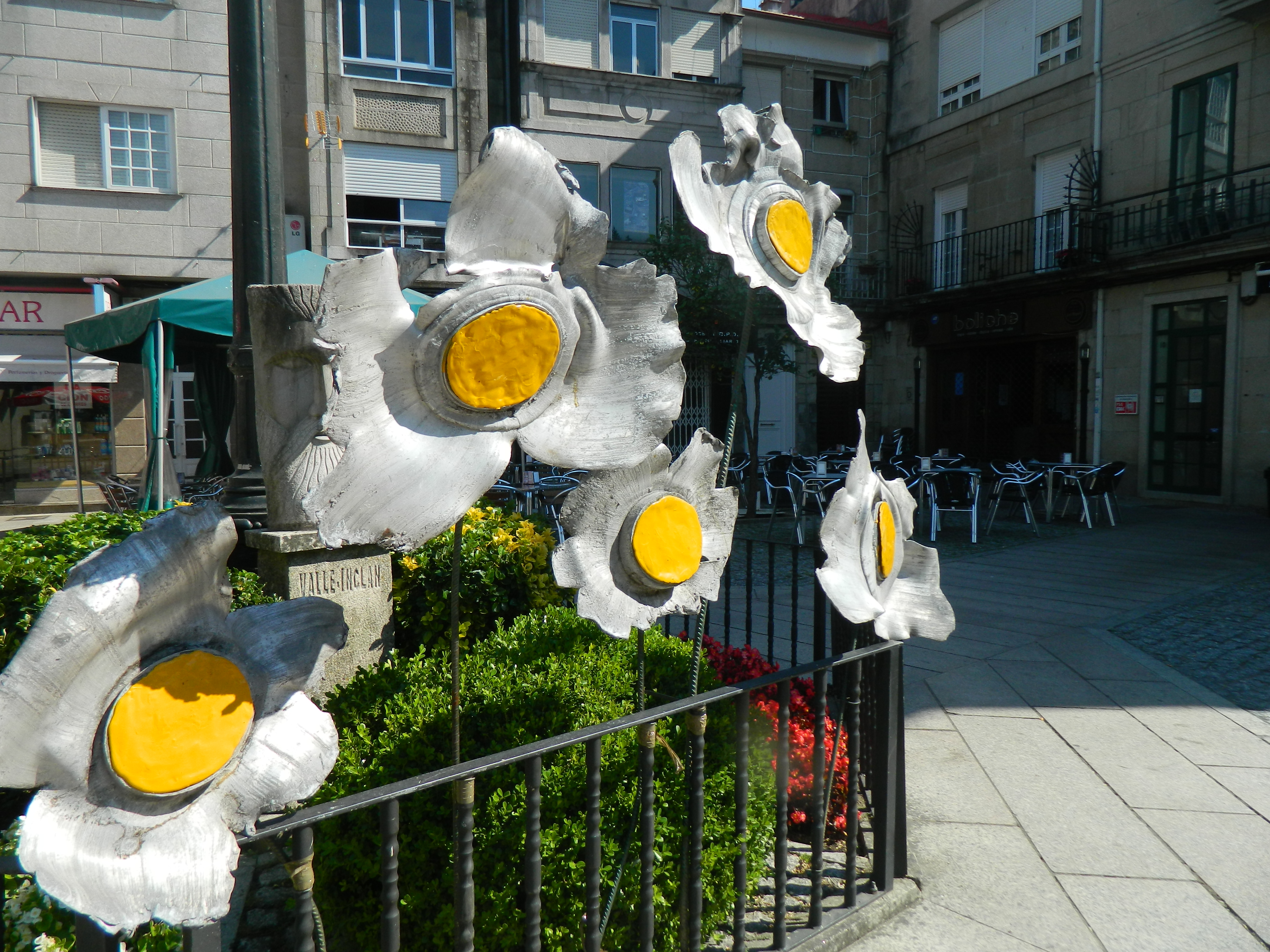 Obra de Arte Lixo, en Redondela.